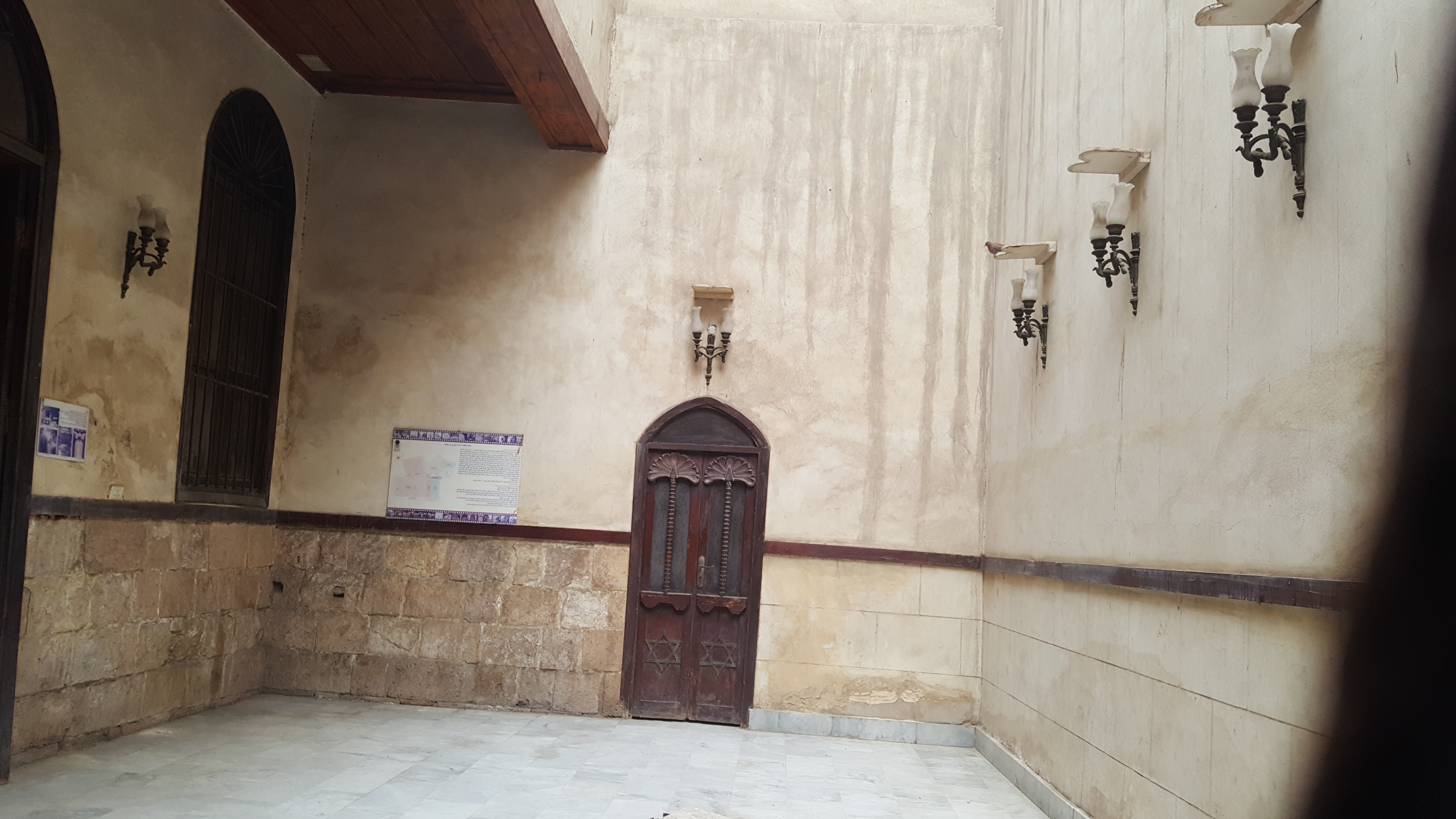 Synagogue of Moses Maimonides